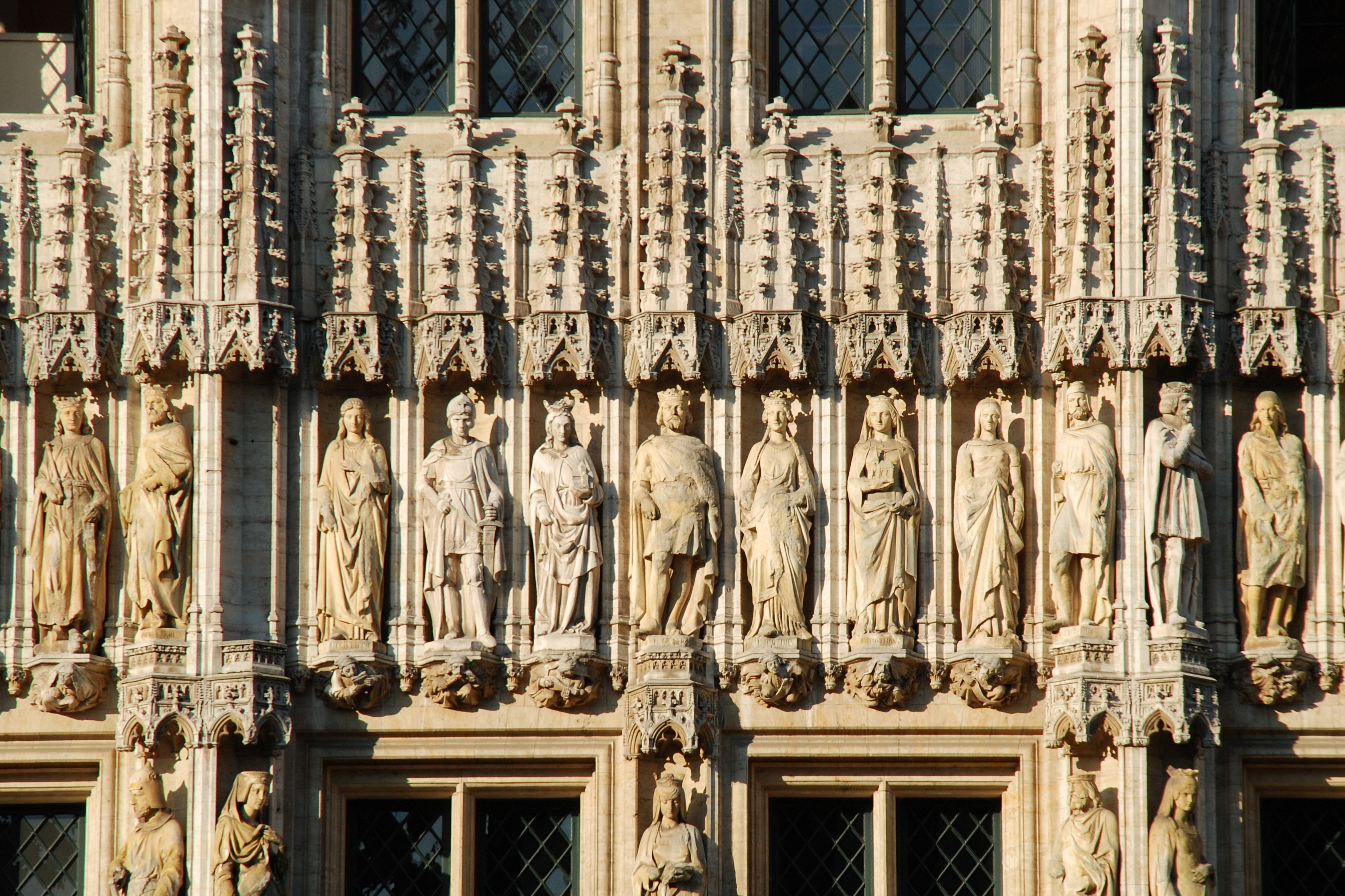 Belgique - Bruxelles - Hôtel de ville de Bruxelles - Statues de l'aile gauche